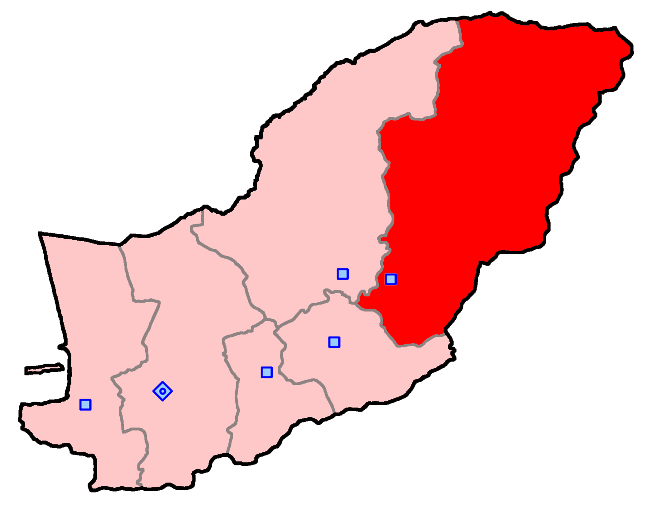 حوزه‌ مینودشت برای انتخابات مجلس شورای اسلامی